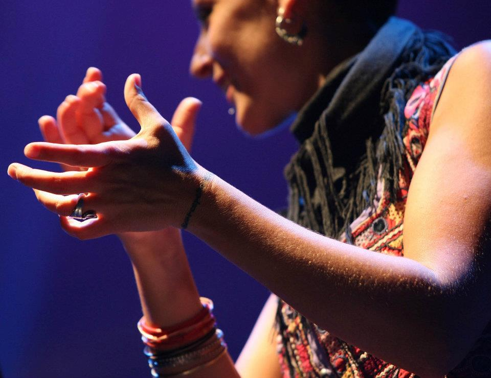 primer plano de las manos de lamari en un concierto